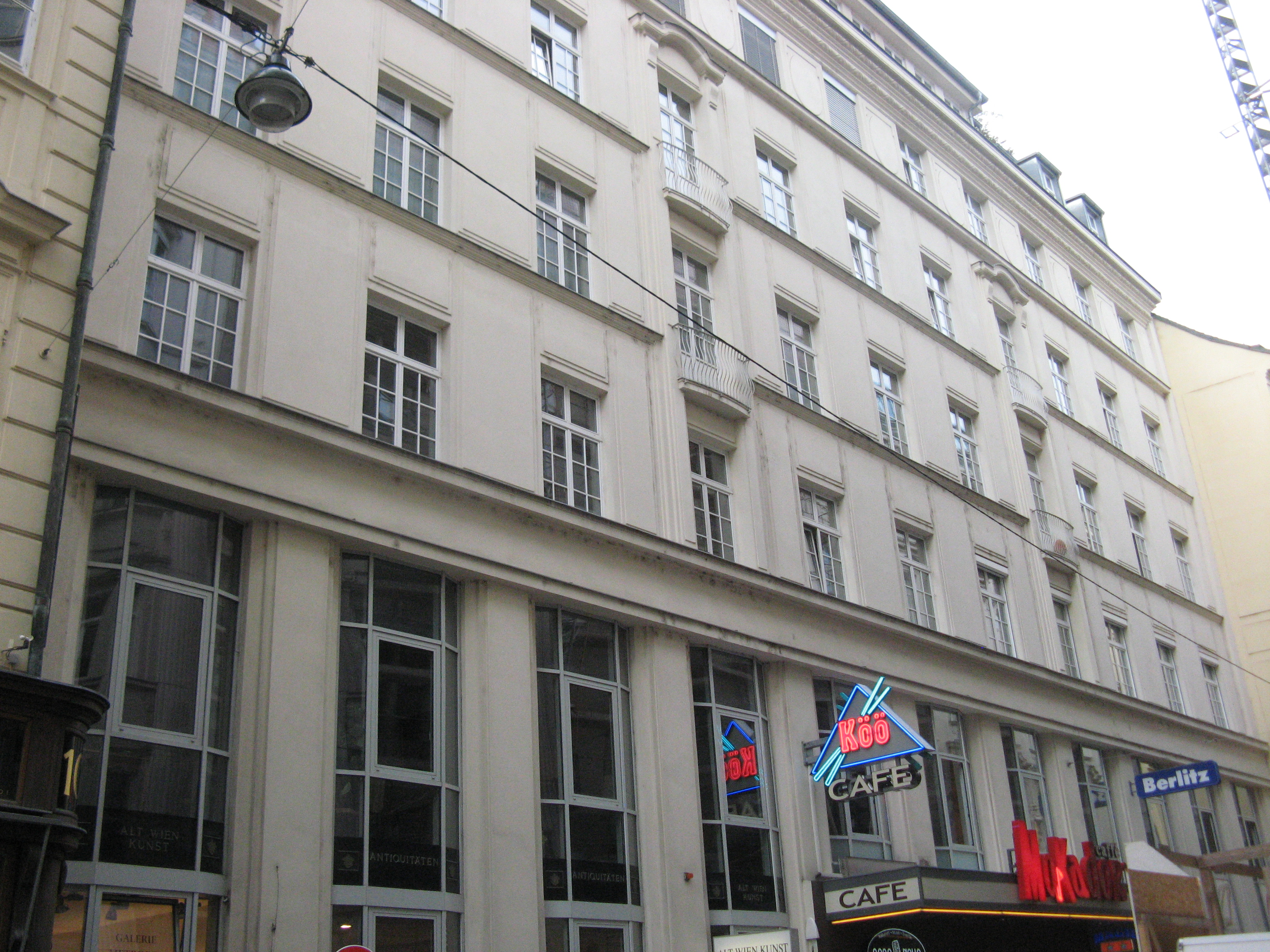 Dorotheergasse 6-8 (1912-13) von Hans Mayr und Theodor Mayer, Wien-Innere Stadt